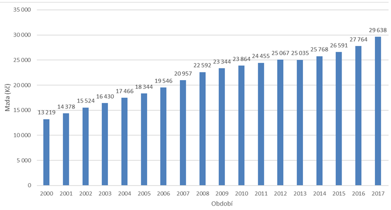 Průměrná hrubá mzda za měsíc - údaje z ČSÚ